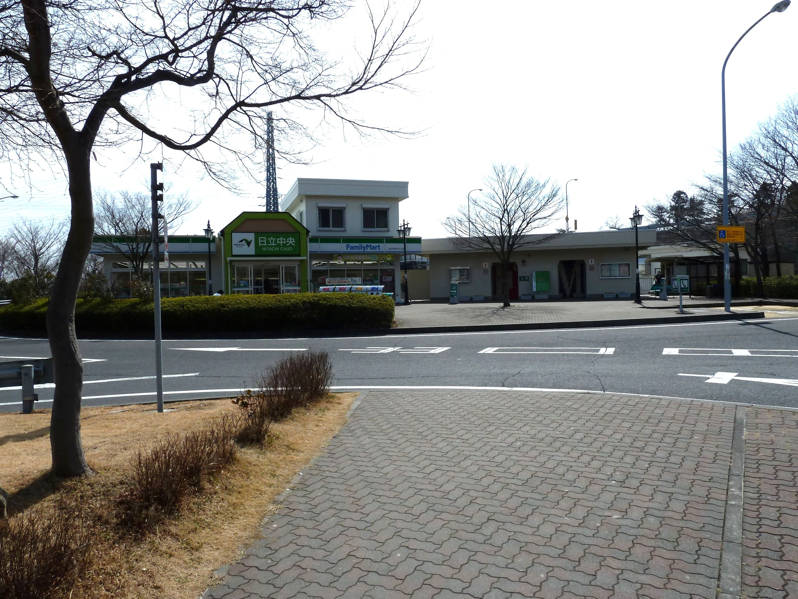 常磐自動車道 日立中央パーキングエリア（上り線）